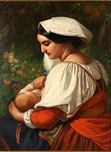 Amalie Bensinger, Bildnis einer stillenden Römerin, bezeichnet "Pomona" und "Rom".